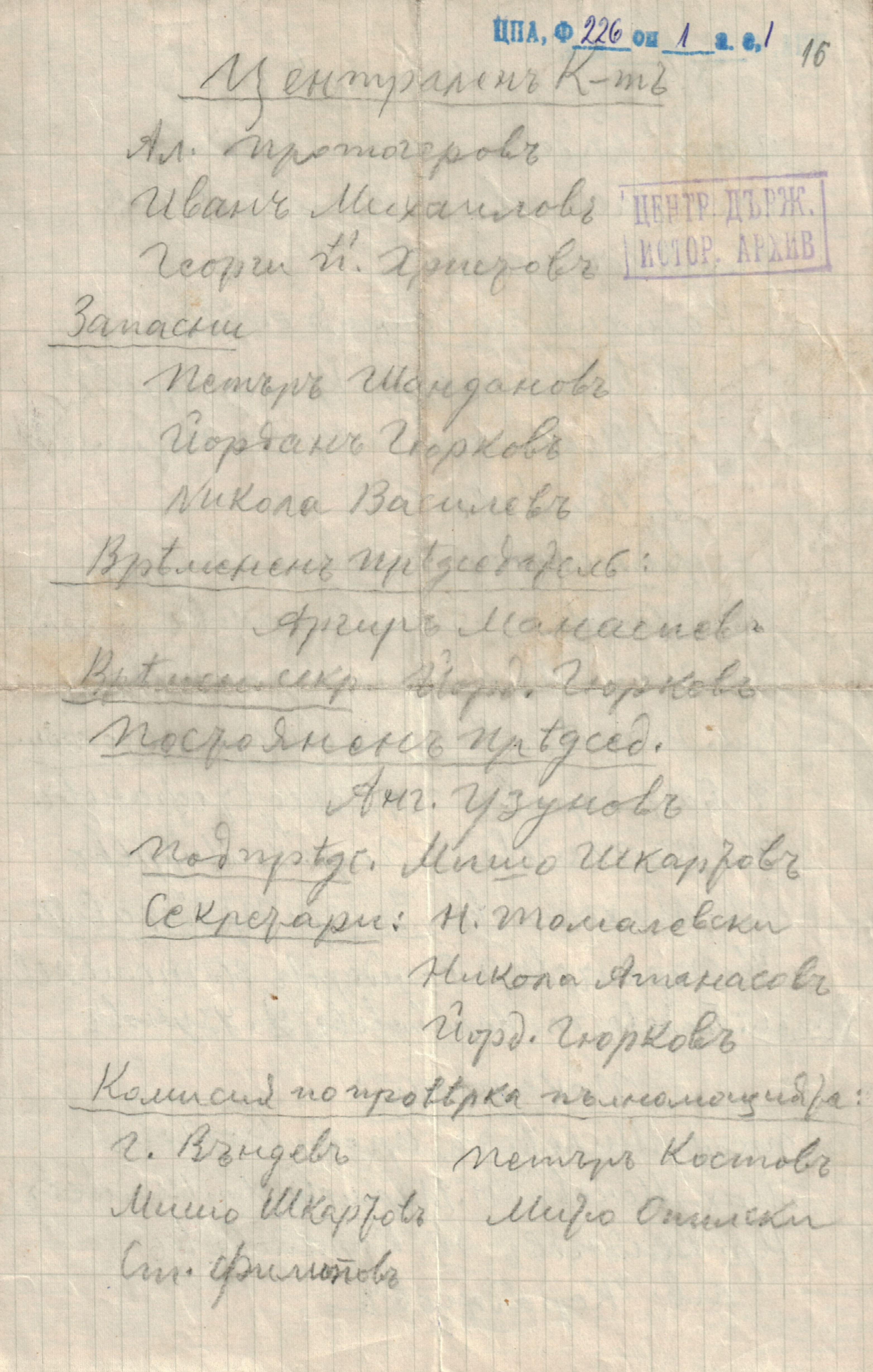 Протоколи, изложения и бележки на и за общите конгреси на ВМРО.